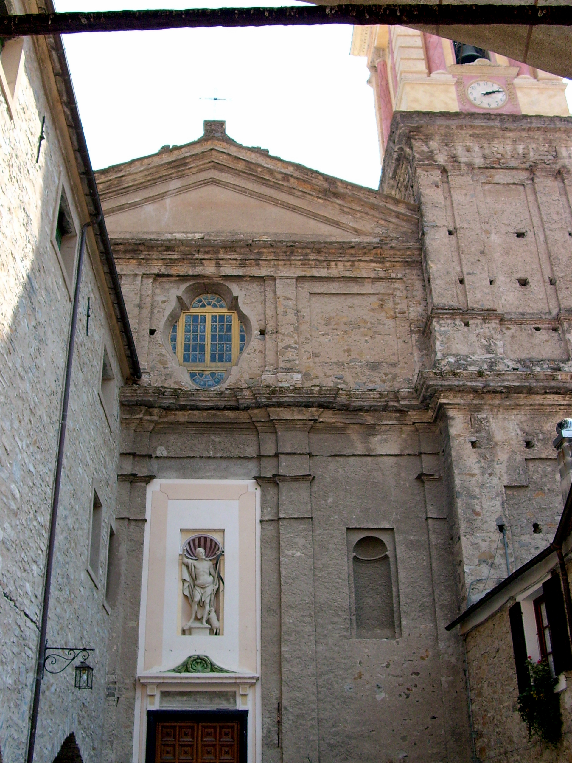 Chiesa di San Giovanni Battista di Montalto Ligure, Liguria, Italia.